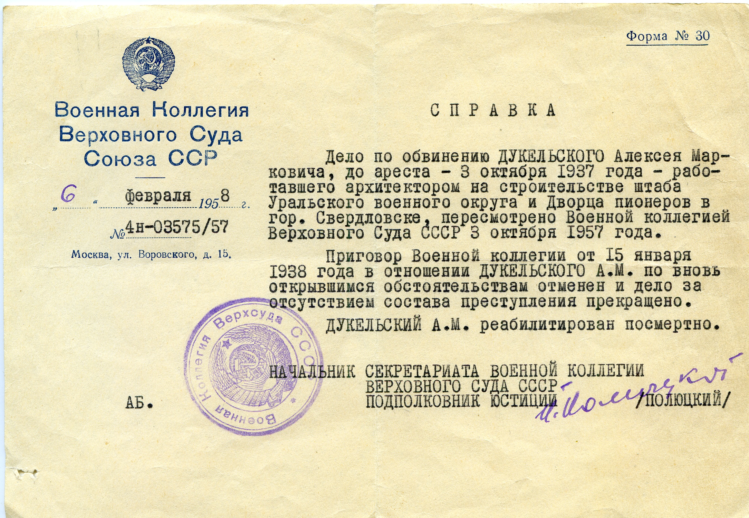 Справка о реабилитации Дукельского Алексея Марковича от 6.02.1958г.